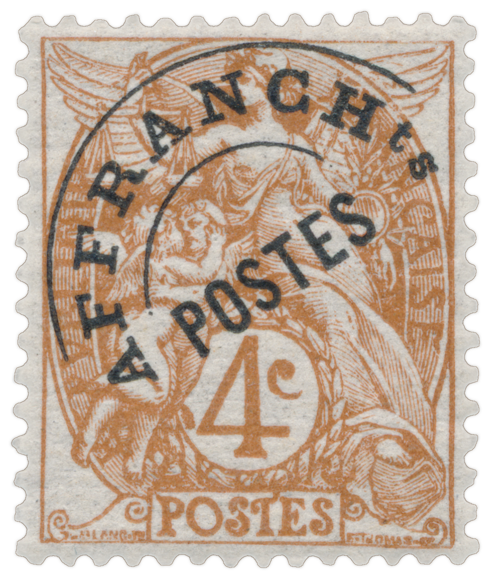 Préoblitérés de type Blanc (1924)